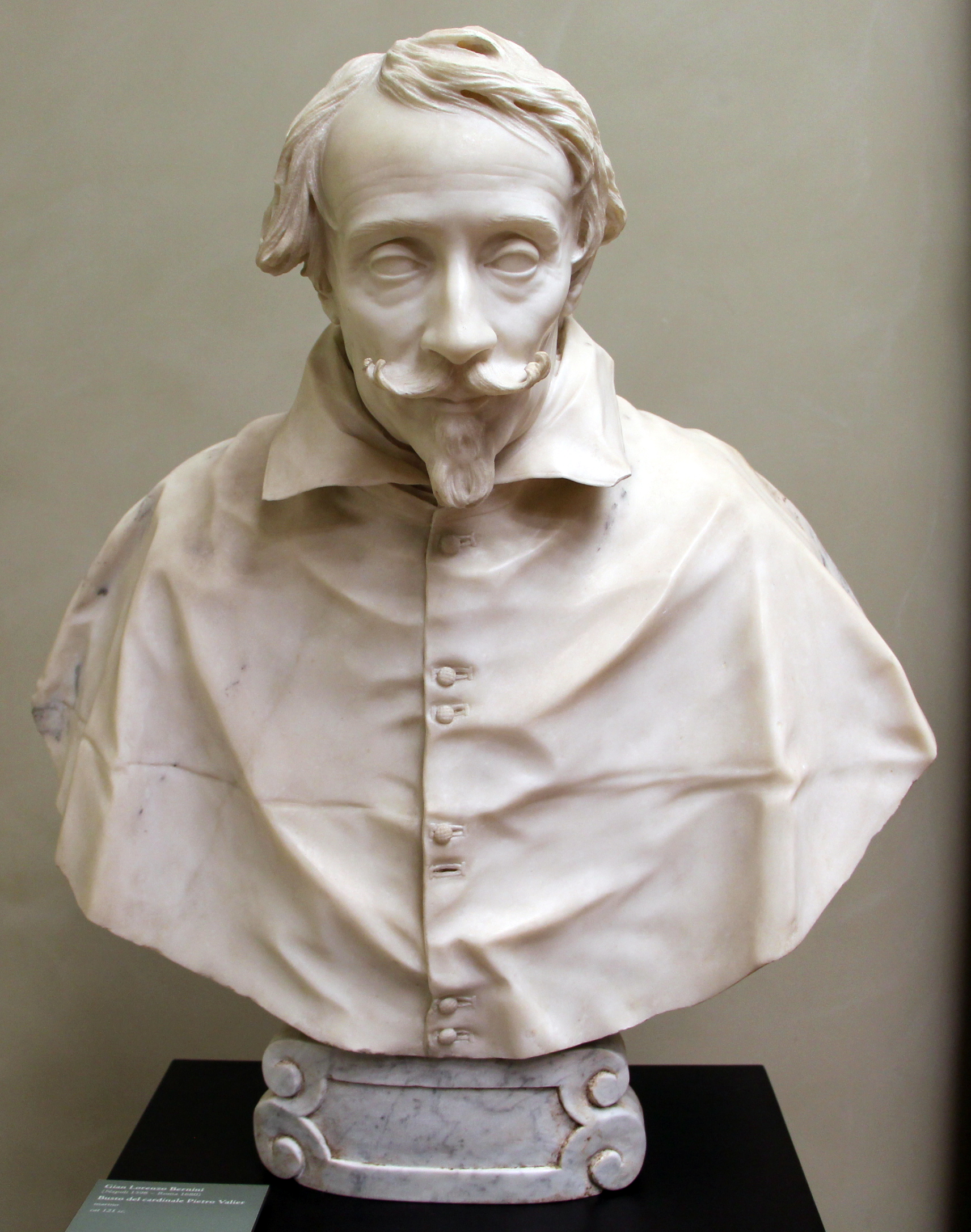 Galleria G. Franchetti alla Ca' d'Oro - MIBAC The making of this document was supported by Wikimedia CH. (Submit your project!) For all the files concerned, please see the category Supported by Wikimedia CH. This is a photo of a monument which is part of cultural heritage of Italy.